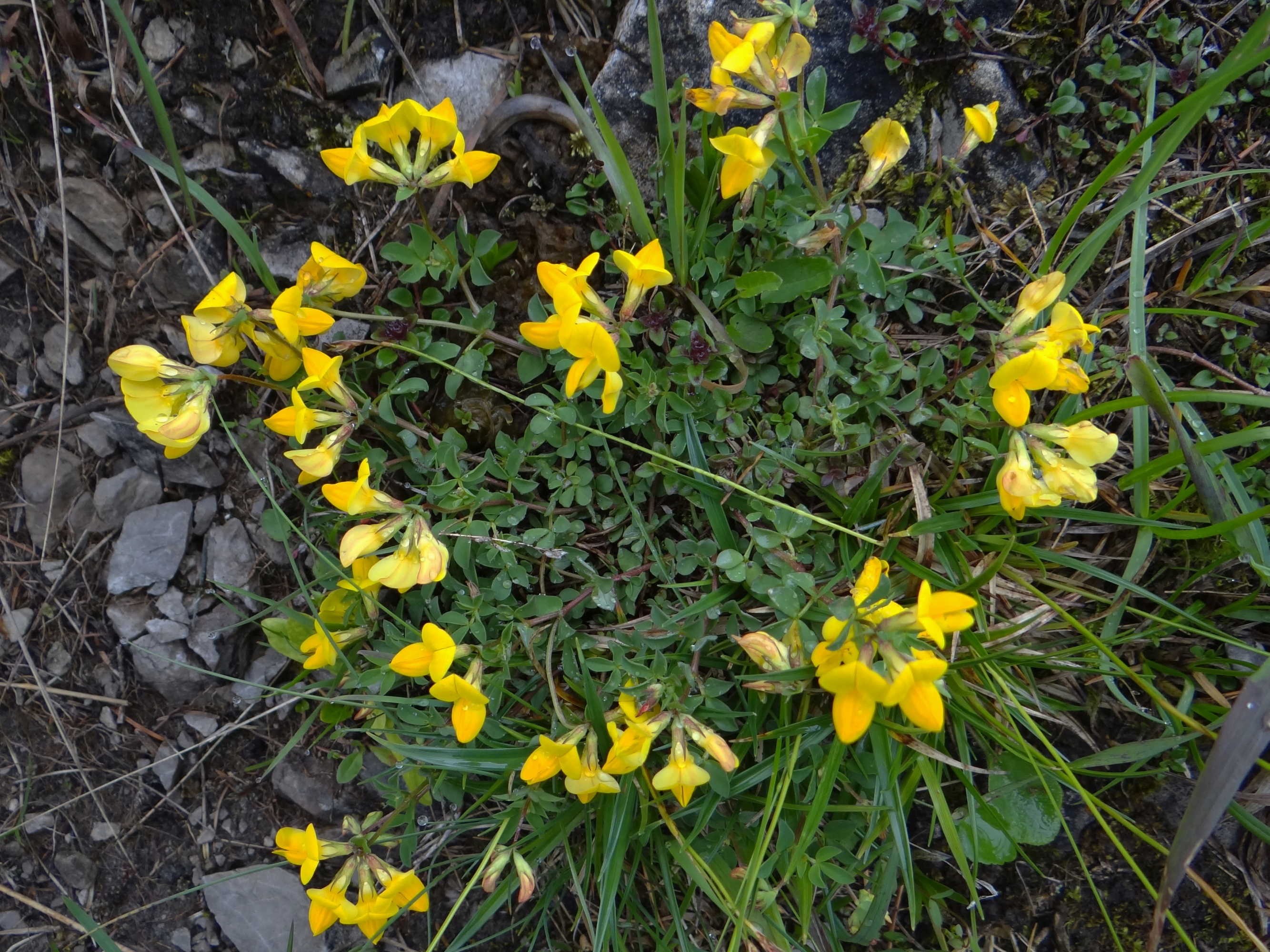 Lotus corniculatus